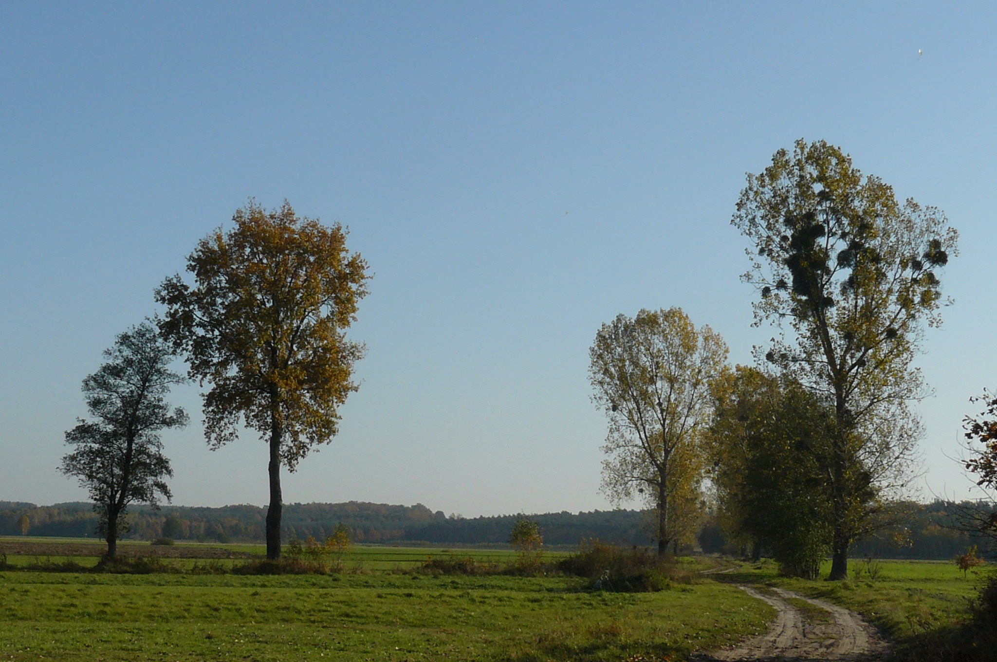 Dolina Obry w okolicy Studziannej.